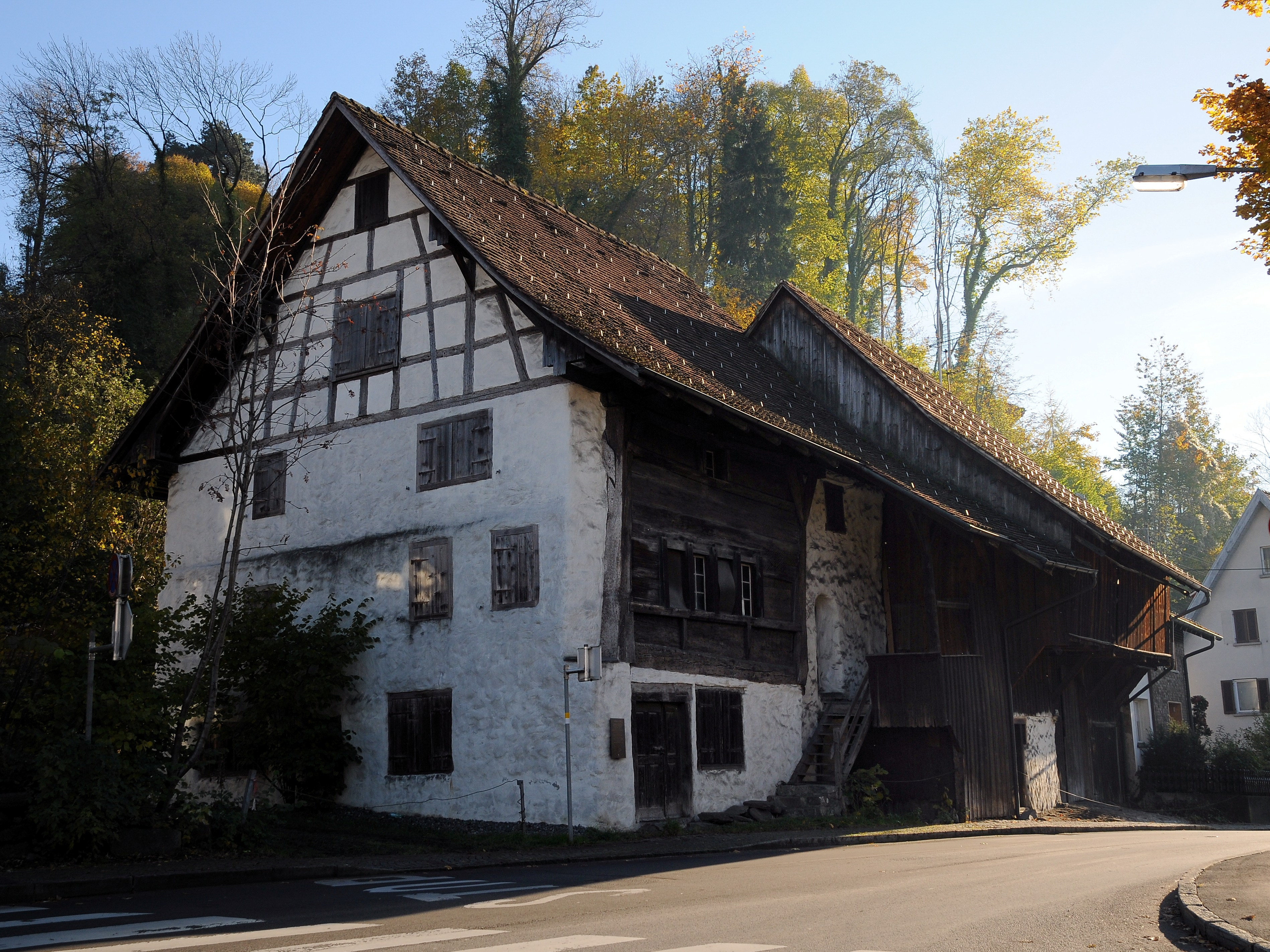 aus dem DEHIO Vorarlberg 1983: Sogenanntes Schloßguggerhaus, halbvollendeter Rheintalhof, Wohnteil 2geschossig über Werkstatt, giebelseitig in Bruchsteinmauerwerk errichtet, im Giebel Fachwerk, traufseitig über Mauerwerk Bohlenständerkonstruktion, gekoppelte Fenster, segmentbogige Eingangstür, traufseitige Freitreppe.*** An der Sebastianstraße Nr.24 in Dornbirn, Oberdorf; Es ist das älteste Haus (um 13.Jh.) in Dornbirn.